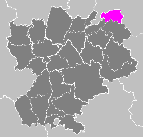 Maps of arrondissements and cantons of France: Arrondissement de Thonon-les-Bains.PNG (Région Rhône-Alpes)